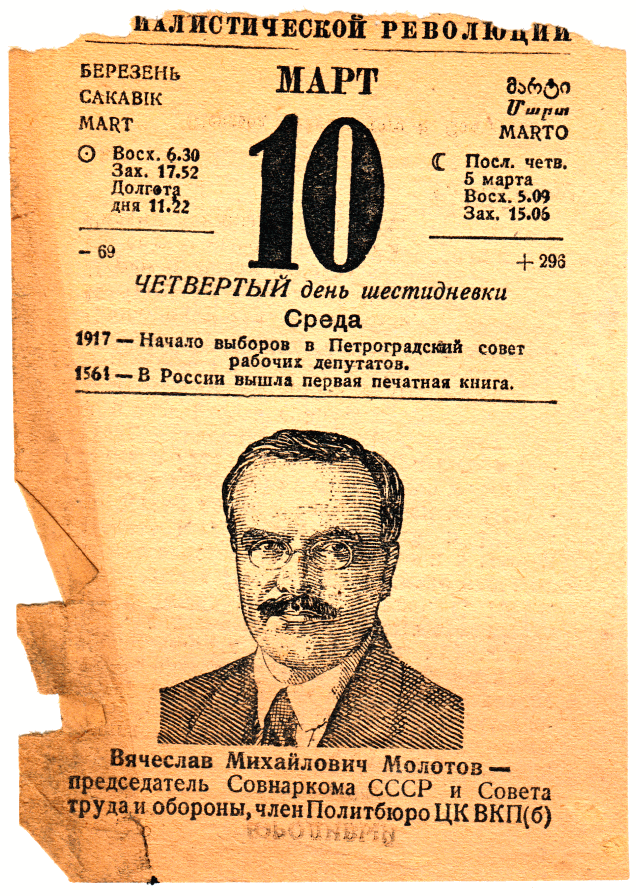 Лист календаря за 10 марта 1937 года